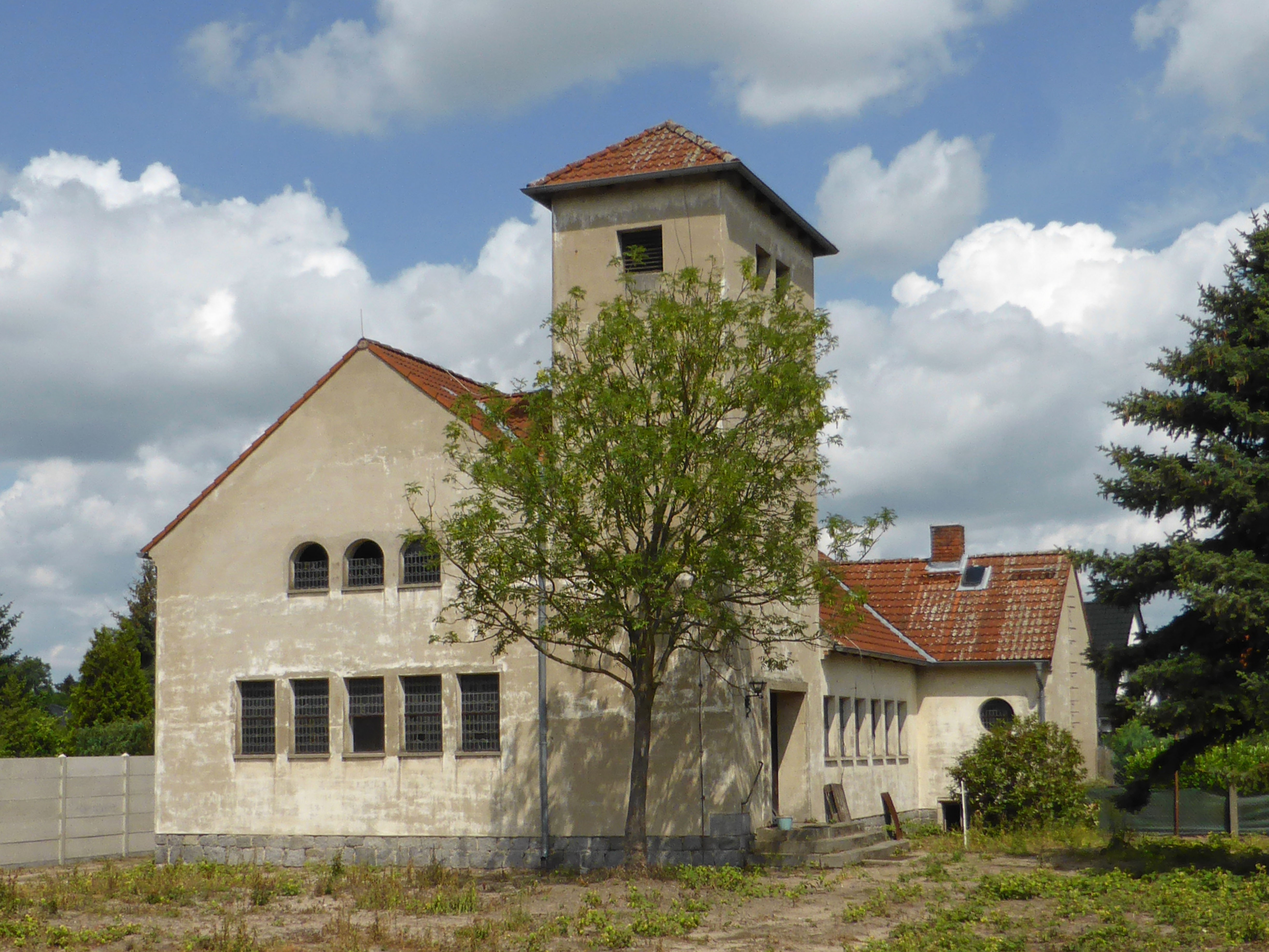 Ehemalige katholische Kirche in Schönhausen (Elbe).